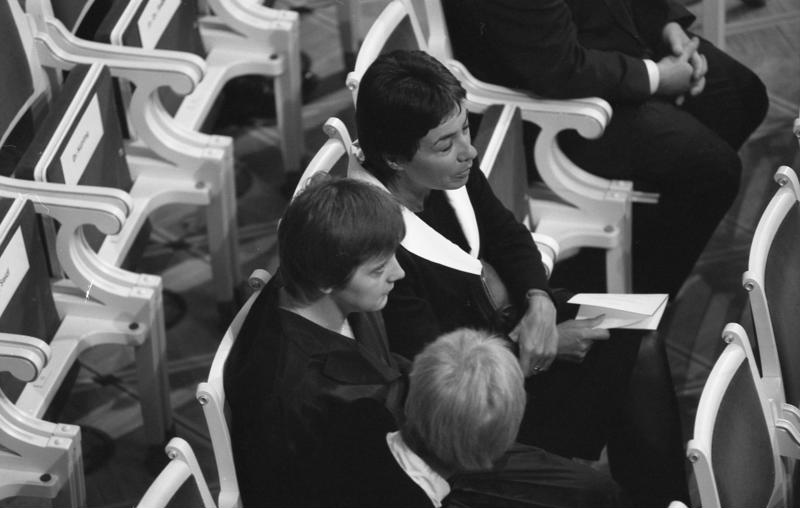 Berlin Im Schauspielhaus in Berlin fand für den am 1.4.1991 von Terroristen ermordeten Präsidenten der Treuhandanstalt, Dr. Detlev Carsten Rohwedder, ein Staatsakt statt. In ihren Ansprachen würdigten Bundespräsident Dr. Richard von Weizsäcker, der Ministerpräsident des Landes Nordrhein-Westfalen, Johannes Rau und der Vorsitzende des Verwaltungsrates der Treuhandanstalt, Jens Odewald, die Verdienste des Verstorbenen. 10.4.1991